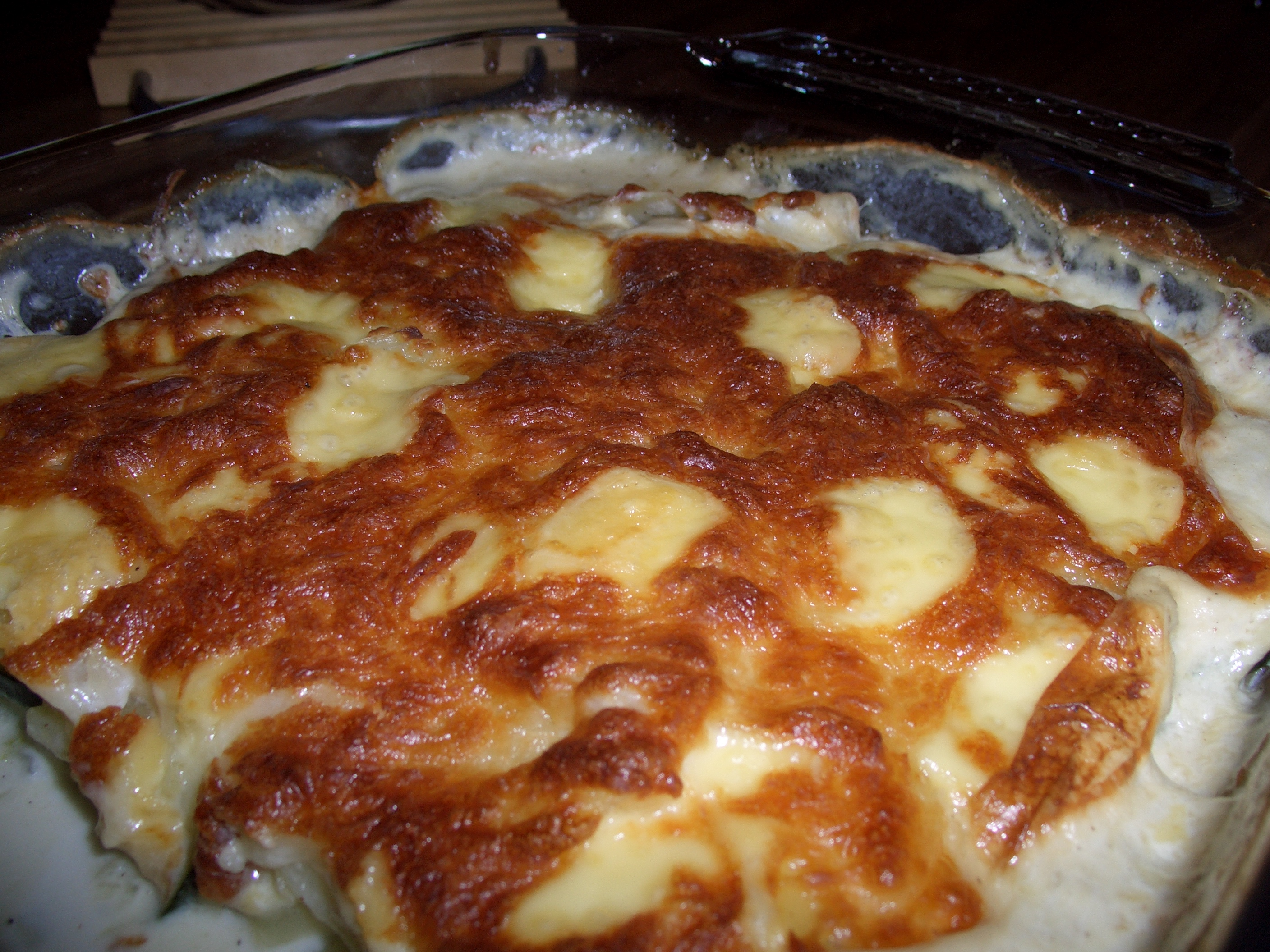 potato gratin